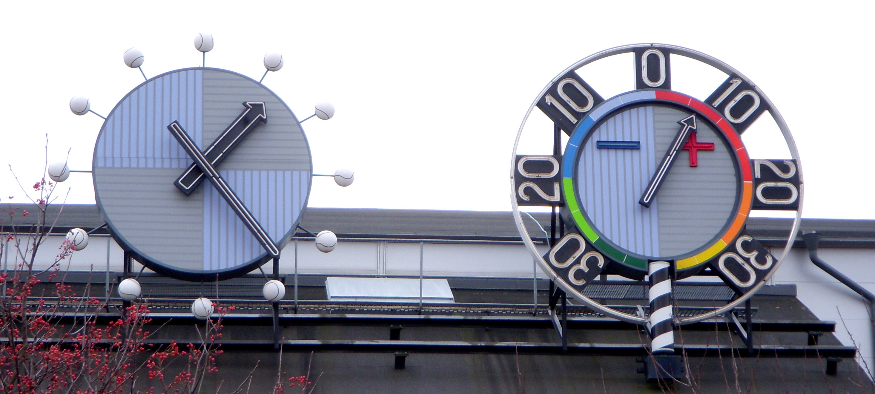 SALK-hallen i Alvik, Bromma, klockan och termometern